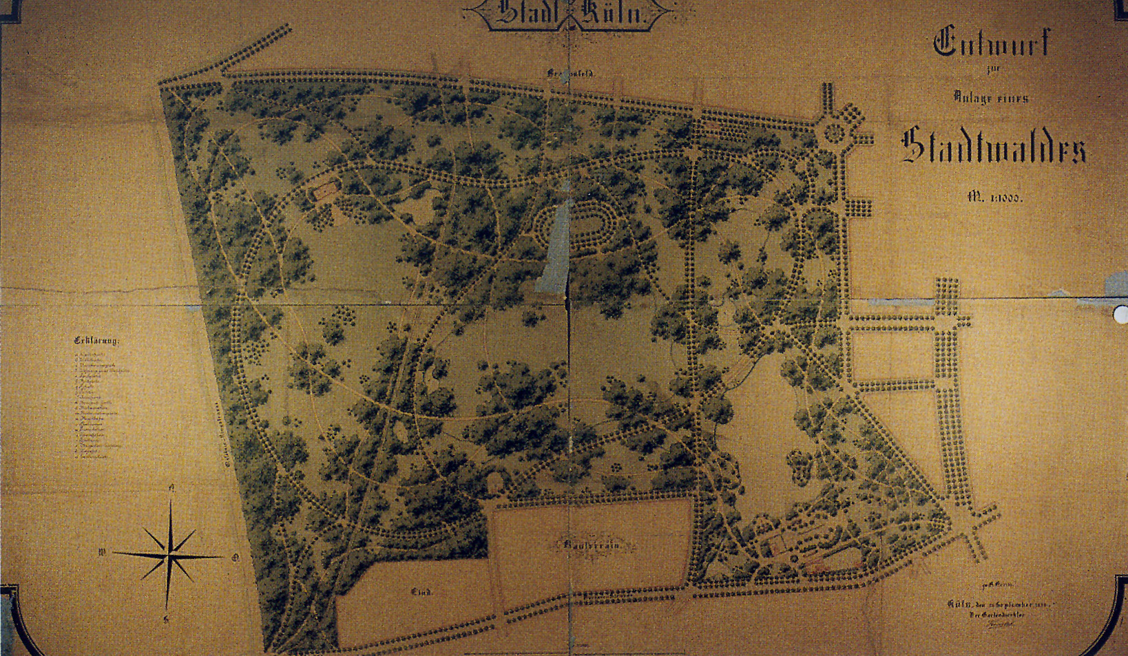 Stadtwaldentwurf von Adolf Kowallek 1895